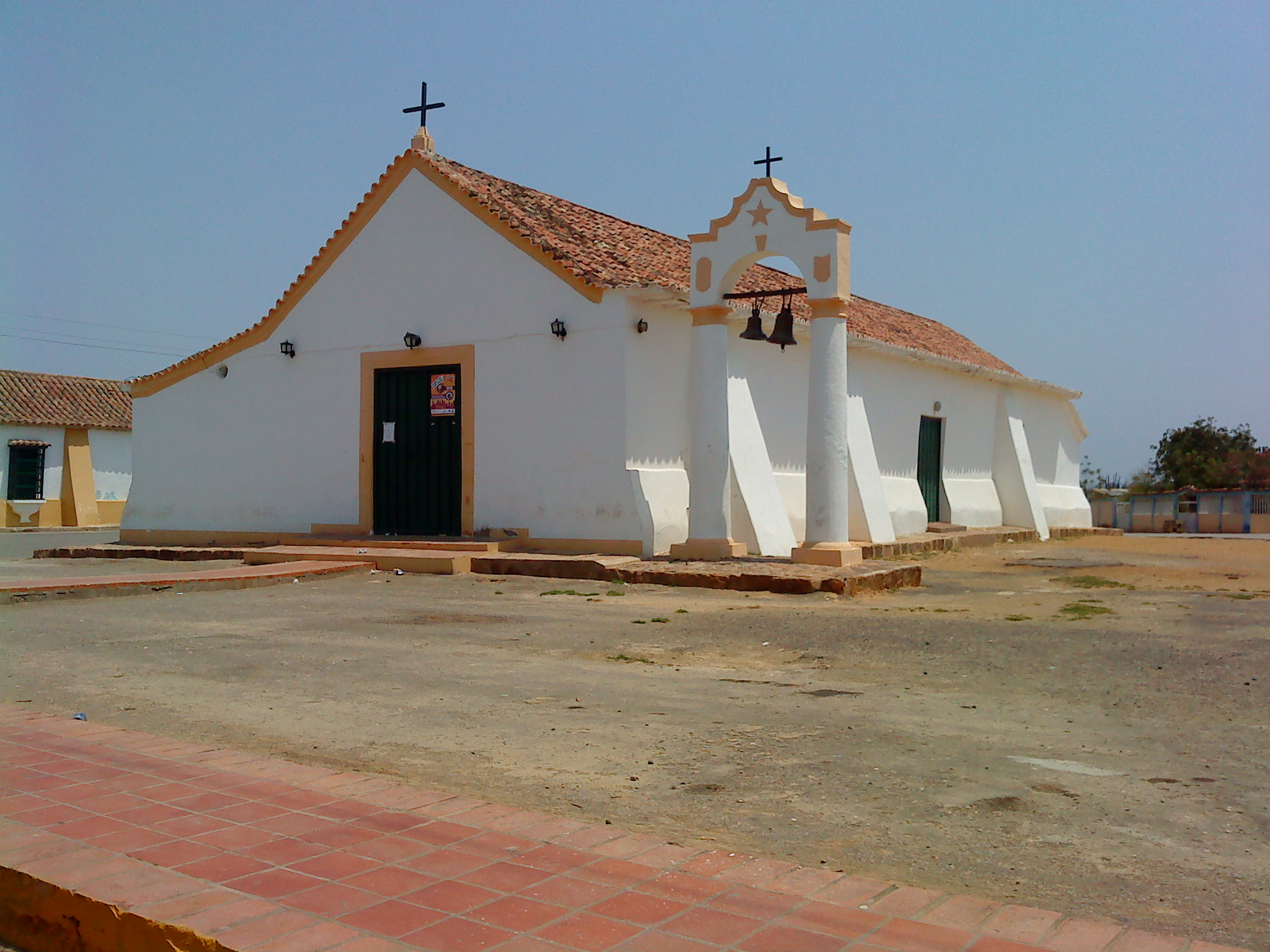 Iglesia de Jadacaquiva.